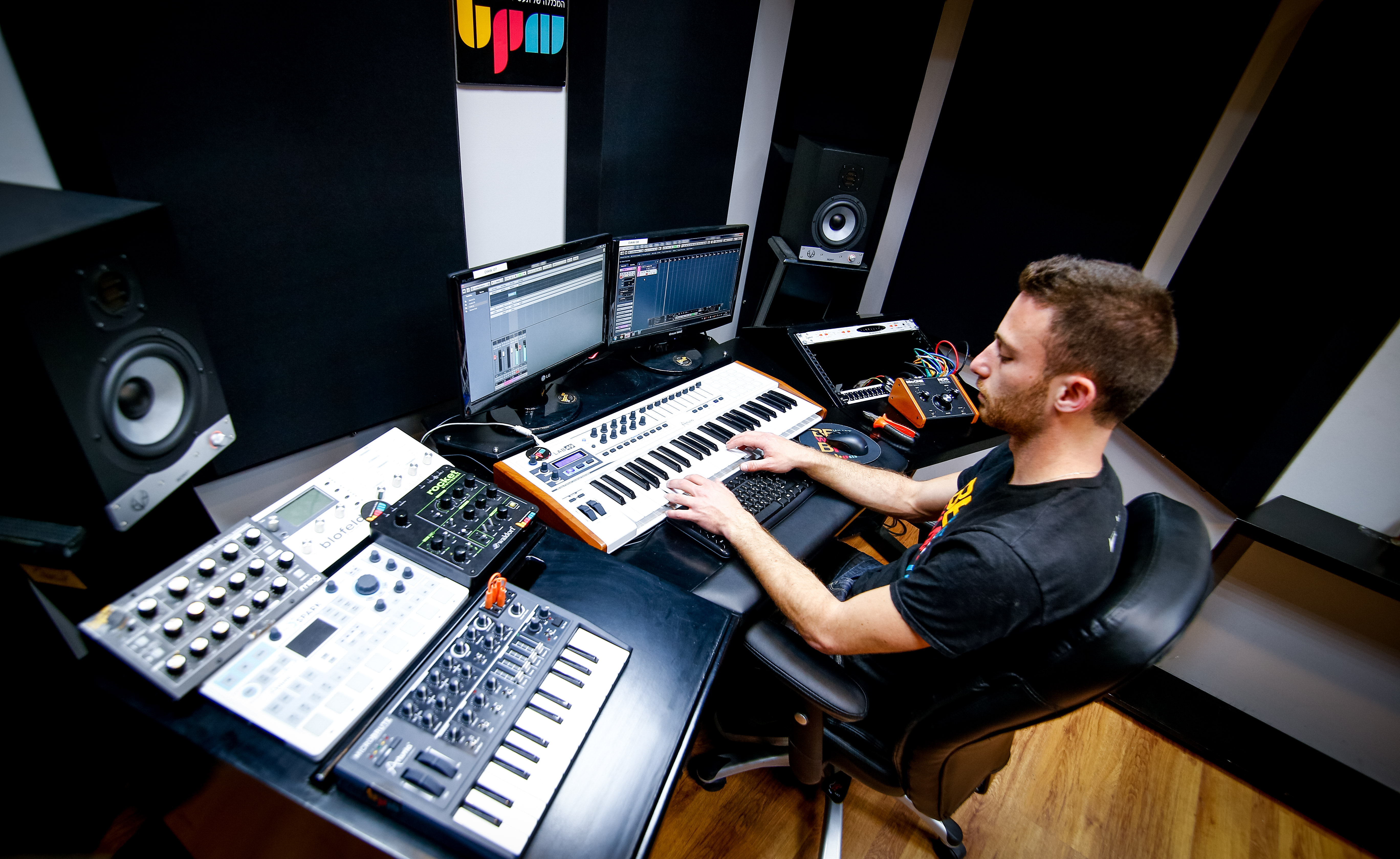 אולפן במכללת ביפיאם המשמש לתרגולי סאונד והפקה מוזיקלית